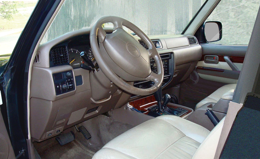 LX450 interior